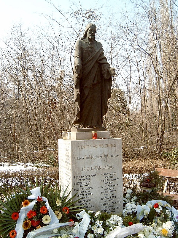 A Jezsuita-rend tagjainak sírboltja Budapesten. Kerepesi temető: 55 [szobrász: Karl F. József].